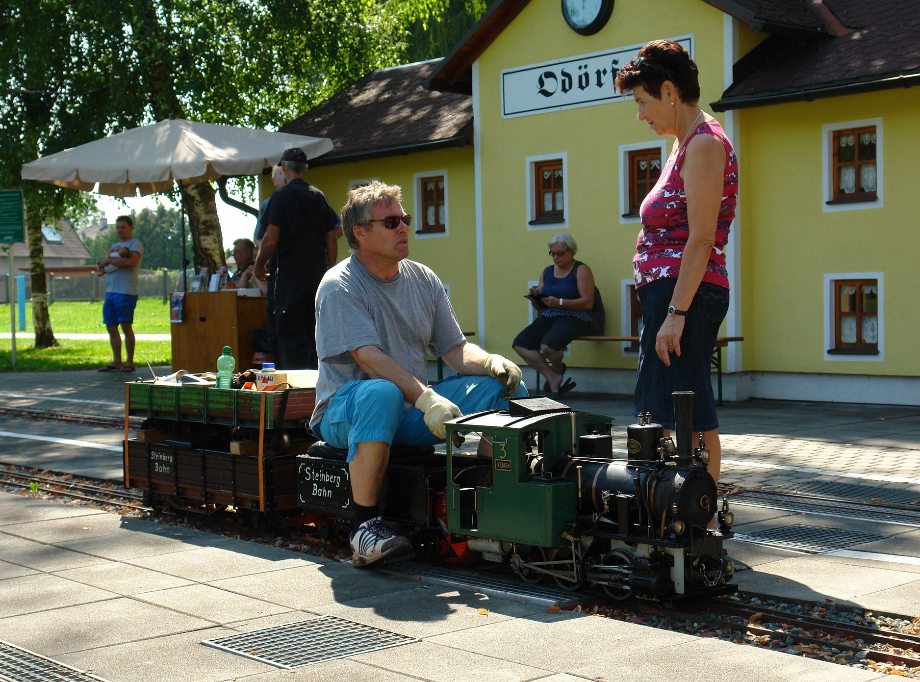 Dampfbahnclub Graz